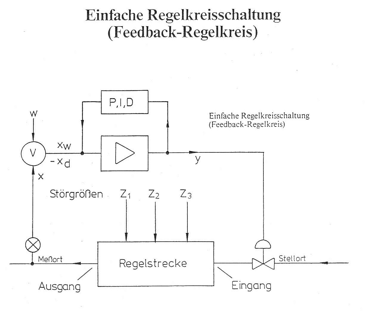 allgemeine Darstellung eines Regelkreises